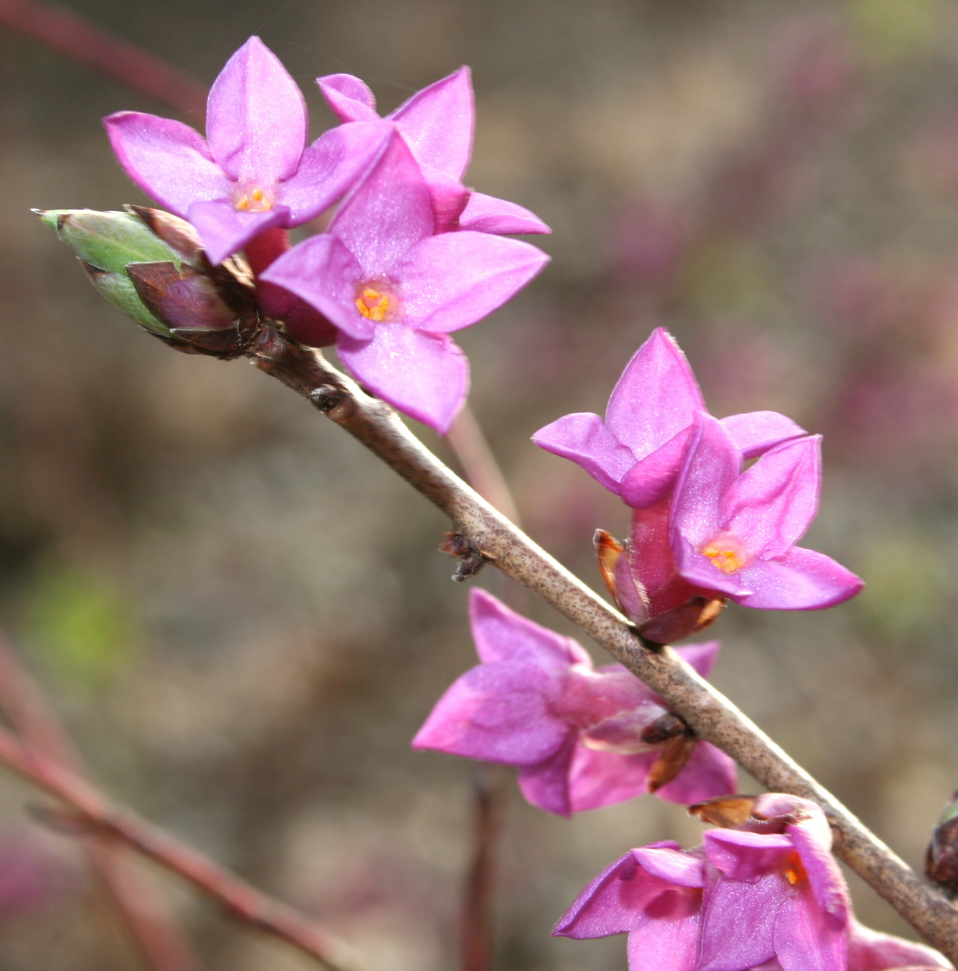 Daphne_mezereum (Dafne mezereo) Località : Noal, Trichiana (BL), 514 m s.l.m.